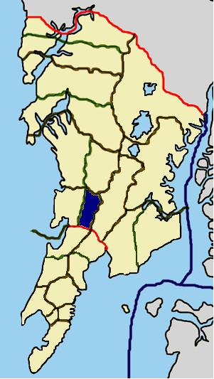 Ubicación del Distrito urbano H-E de Khar-Santacruz en Mumbai